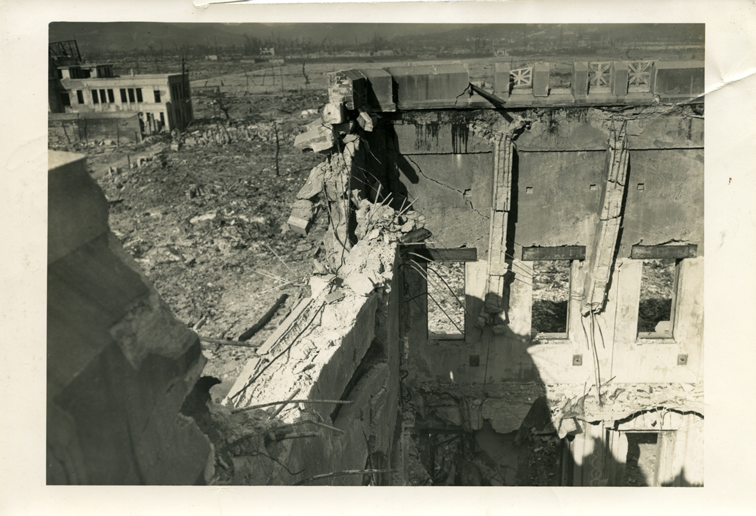 帝国銀行広島支店から北方向を撮影